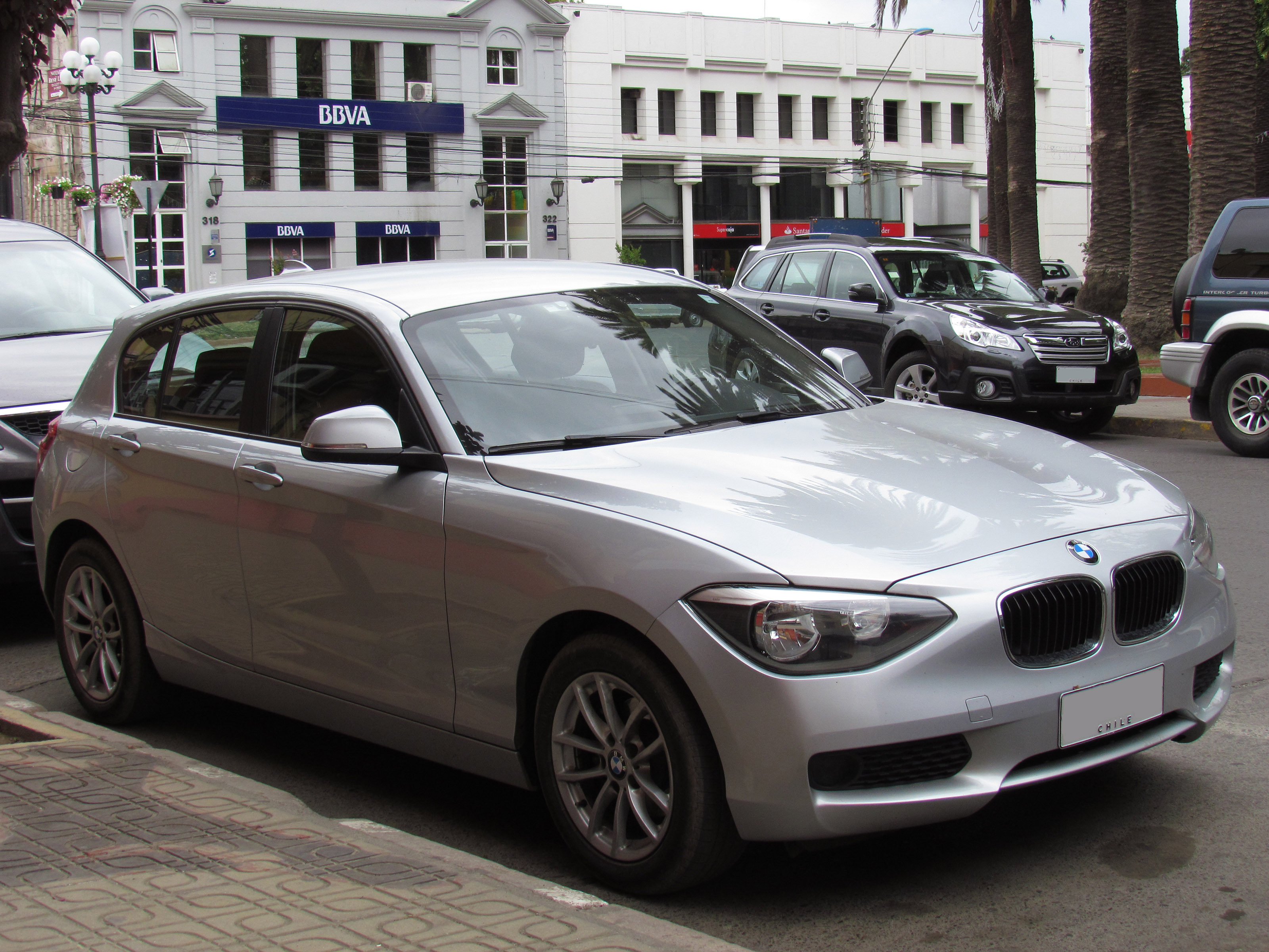 BMW 116i Business 2013